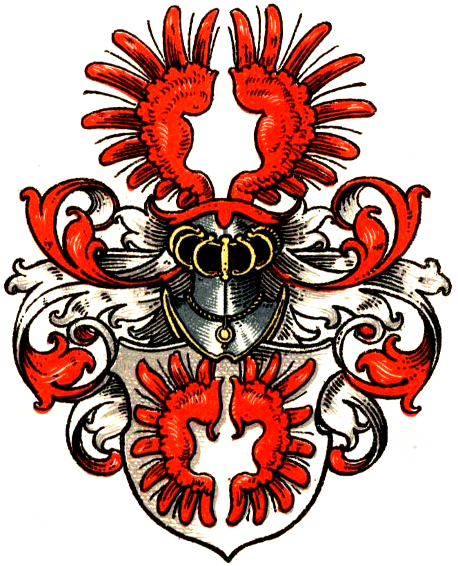 Wappen der von Cloedt